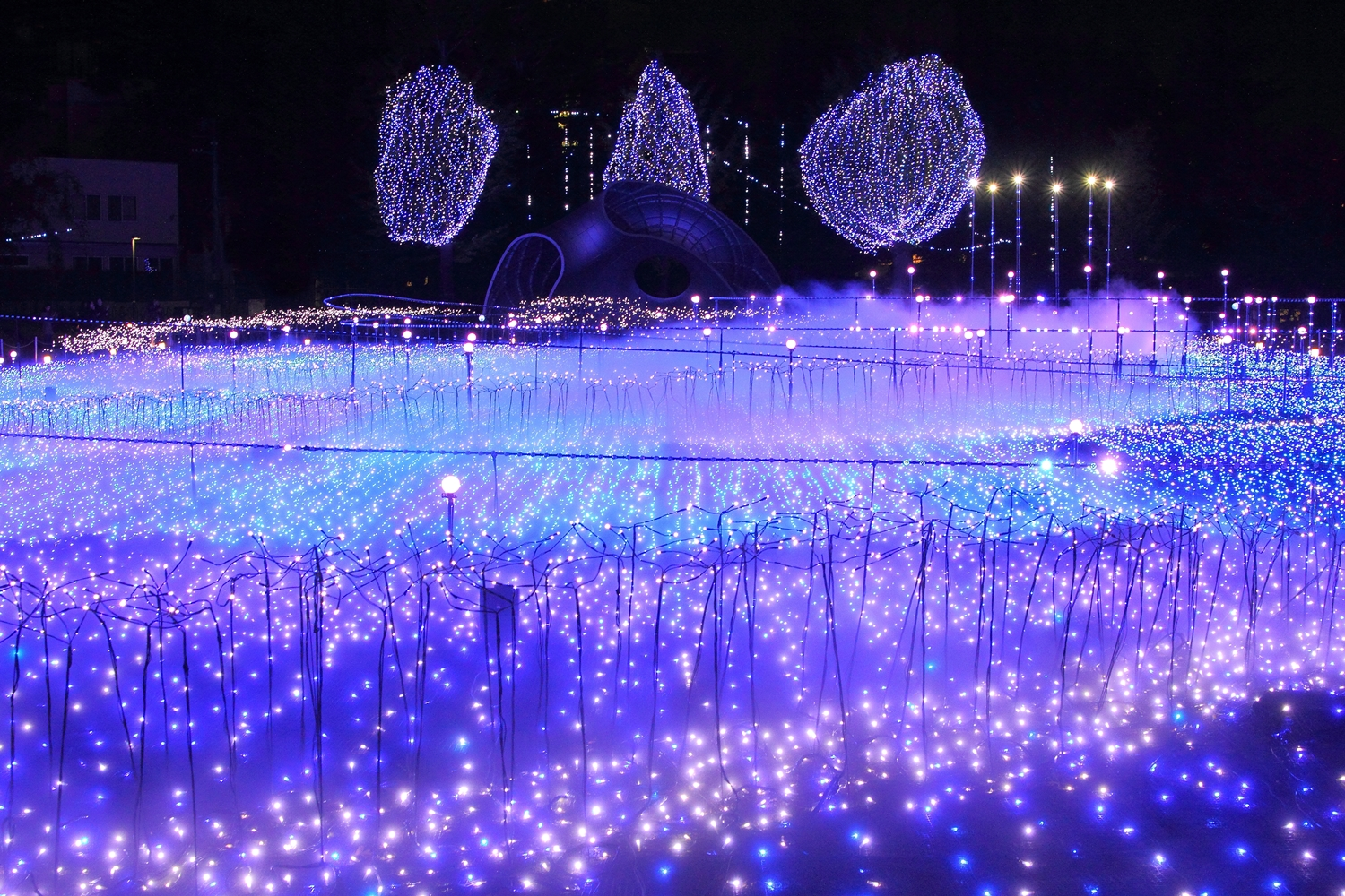 東京ミッドタウン、クリスマスイルミネーション『スターライトガーデン』